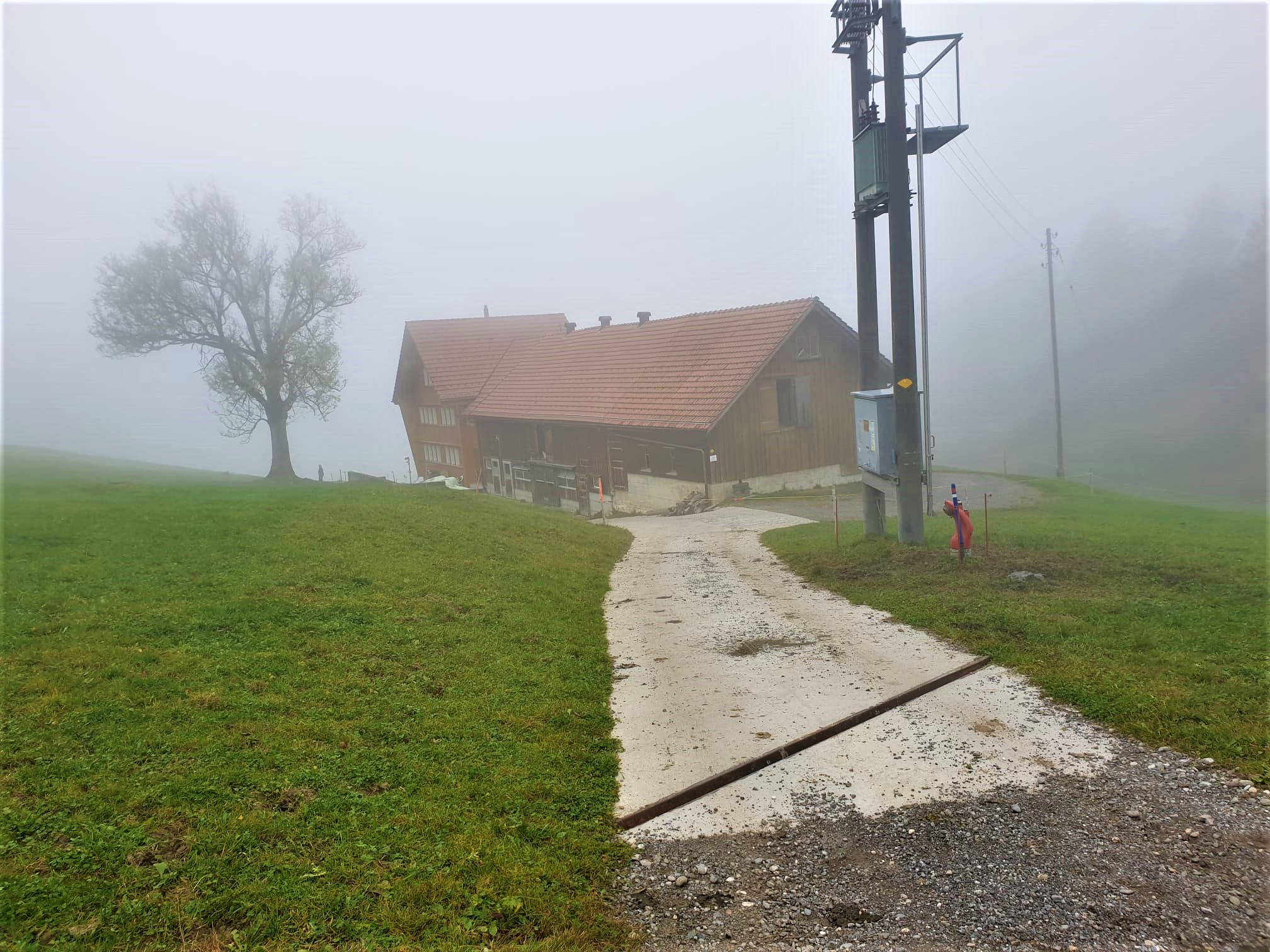 Bauernhaus